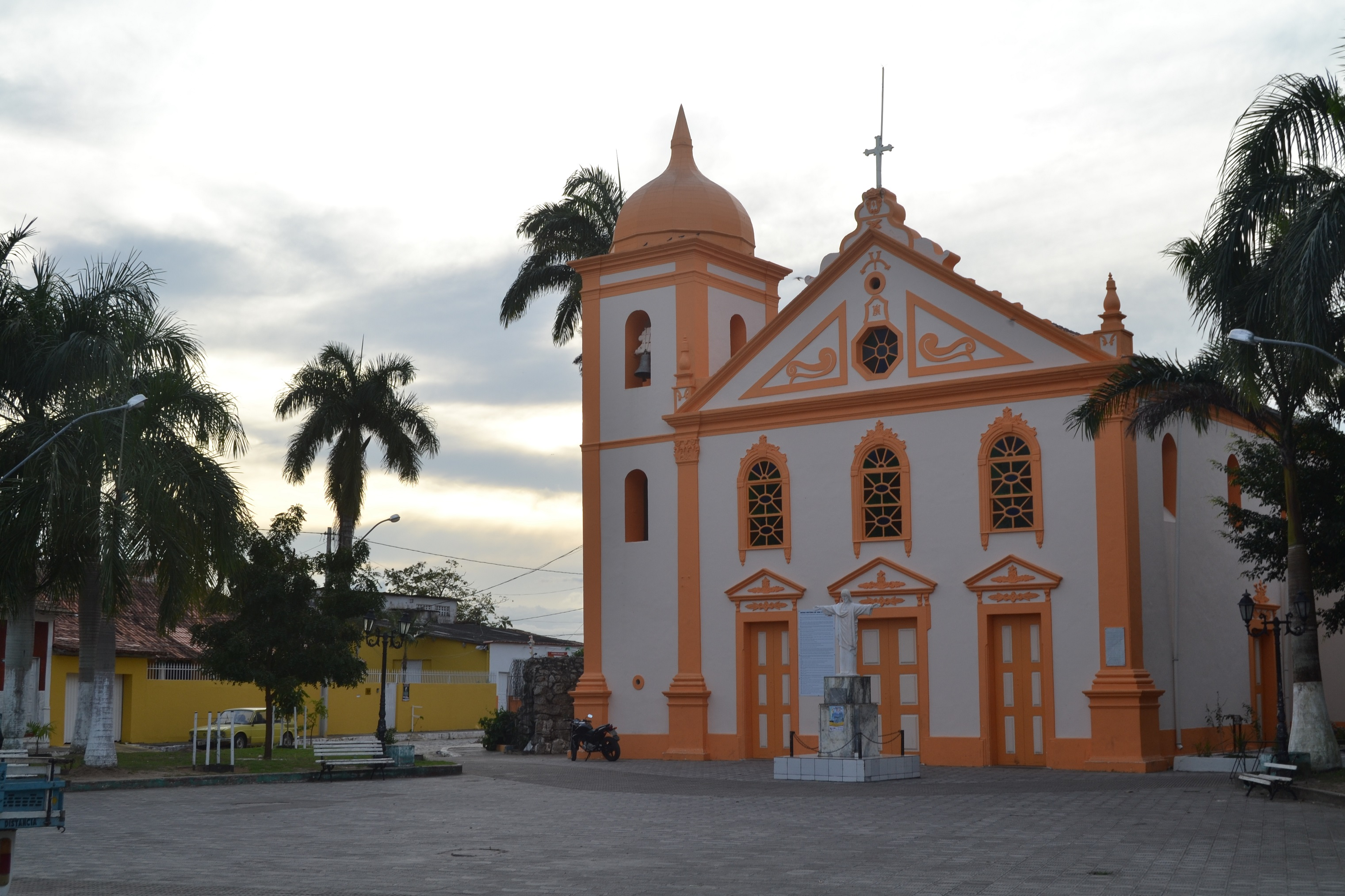 Co-Catedral Santo Antônio em Caravelas - Bahia